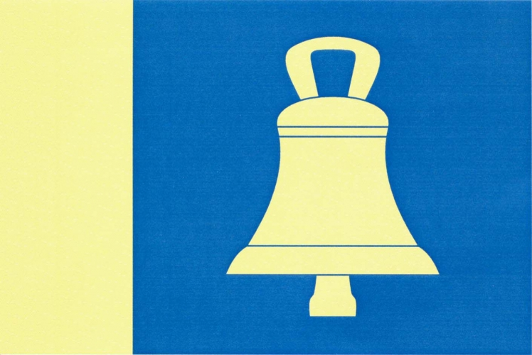 vlajka,Týnišťko , okres Ústí nad Orlicí